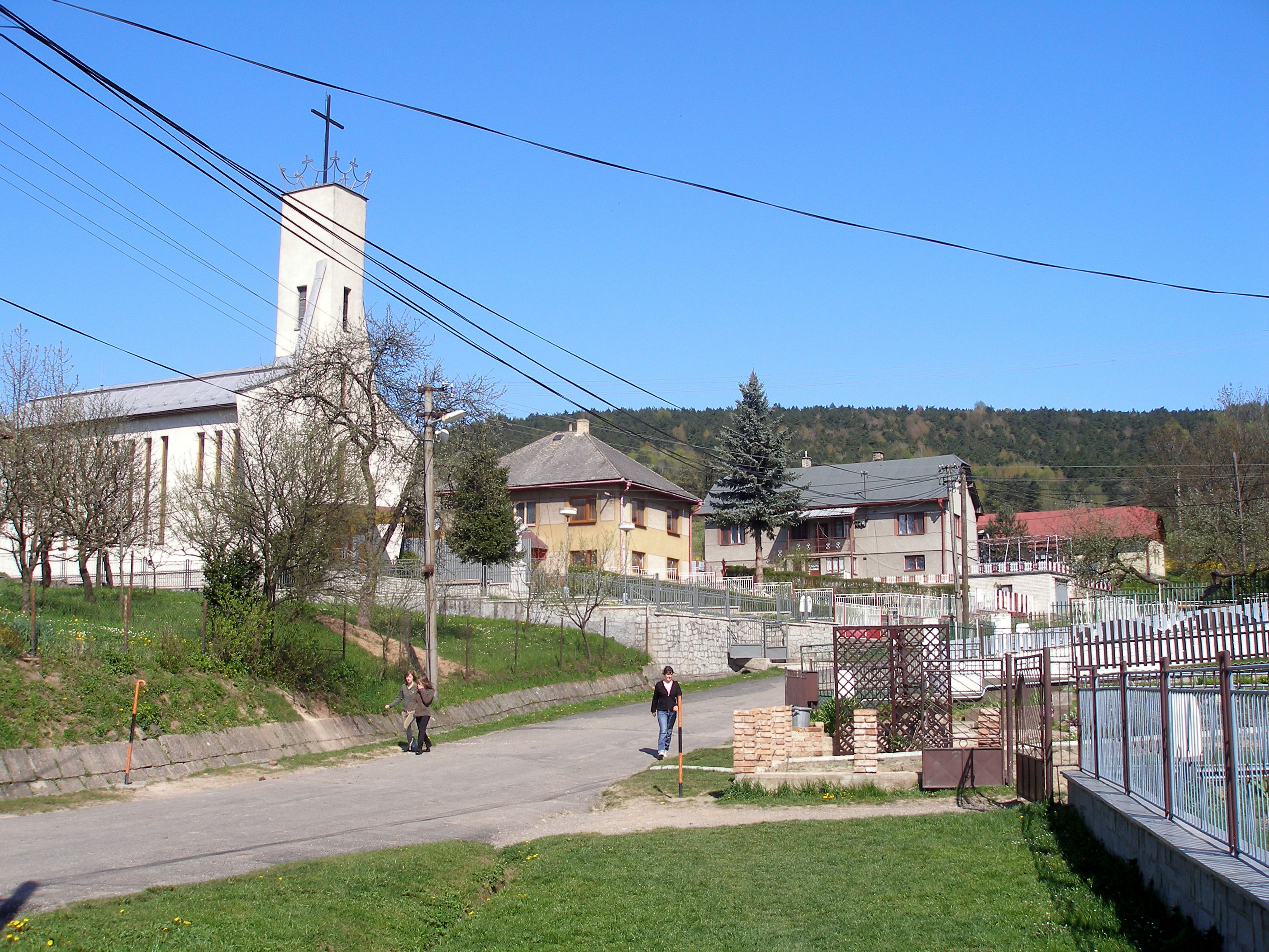 Obec Šarišská Trstená okres Prešov región Šariš